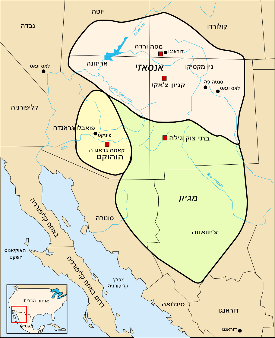 גרסה עברית למקור